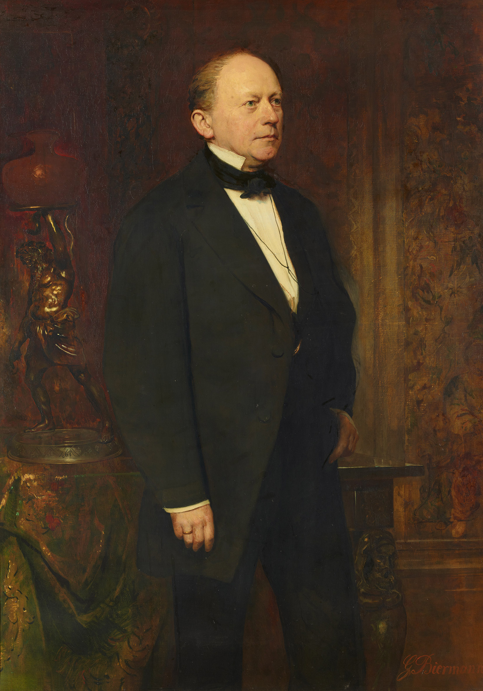 Bildnis des Ministers Rudolph von Delbrück